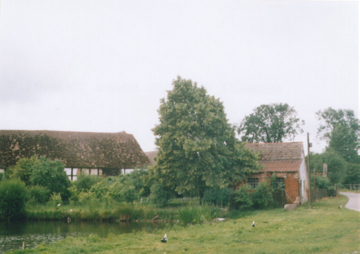 Zabudowa wsi